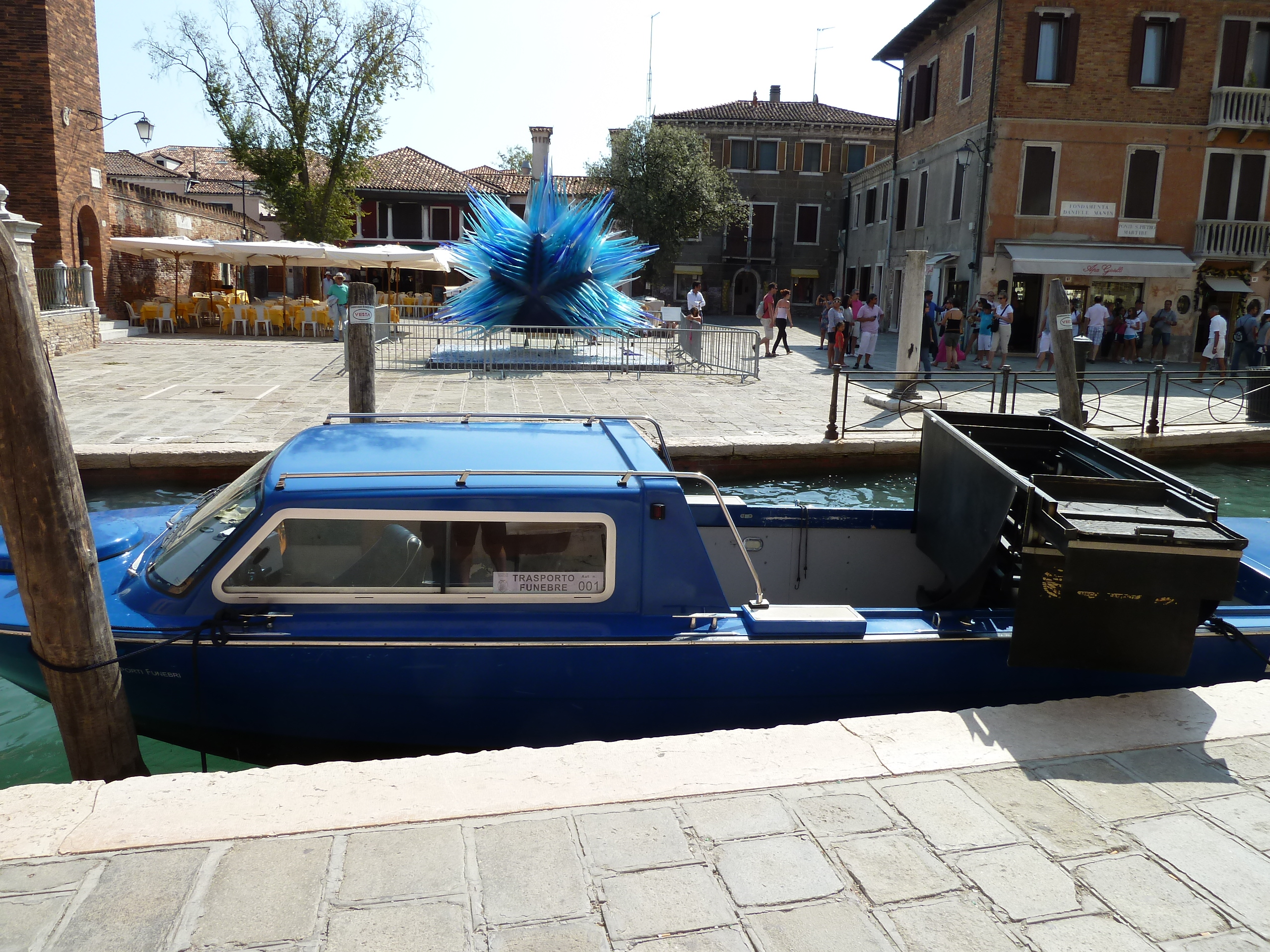 Funeral boat in Murano